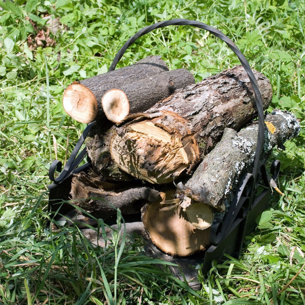 Корзина-дровница. Приспособление, перемещающий инструмент. Используется для удобной переноски дров.